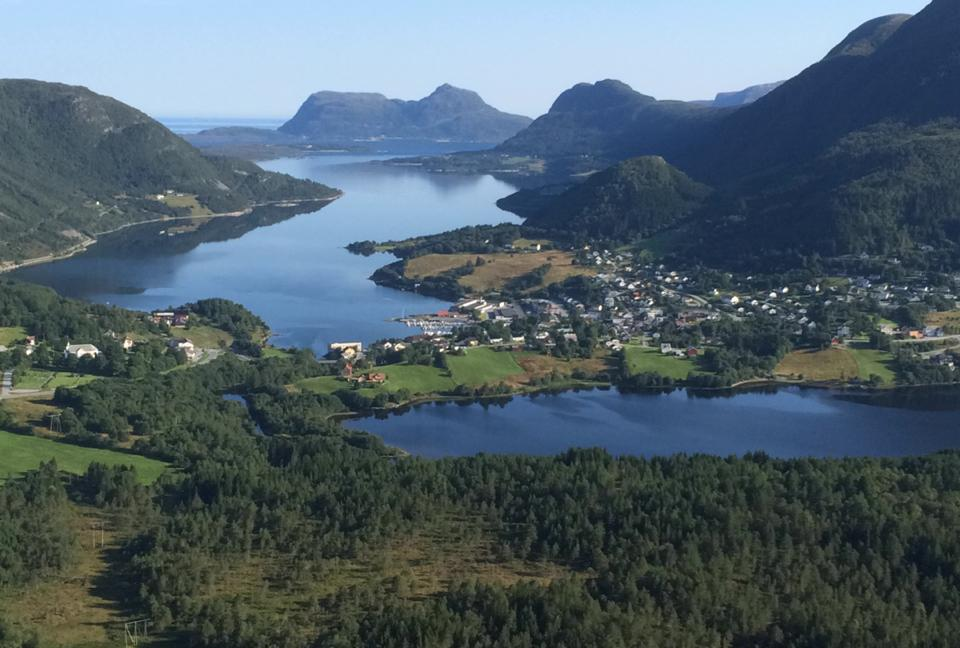 Vatne Møre og Romsdal